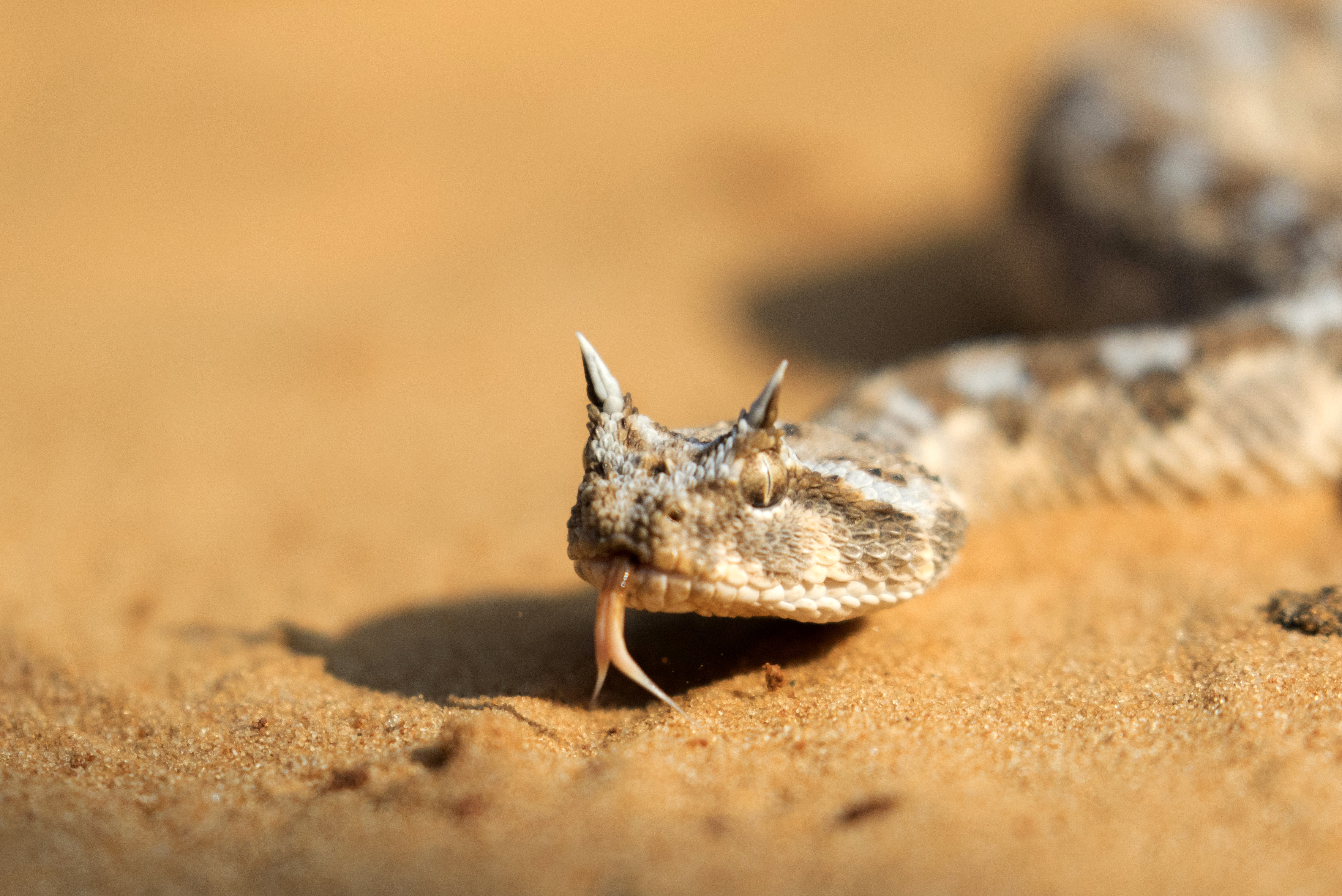 עכן חרטומים חורץ לשון